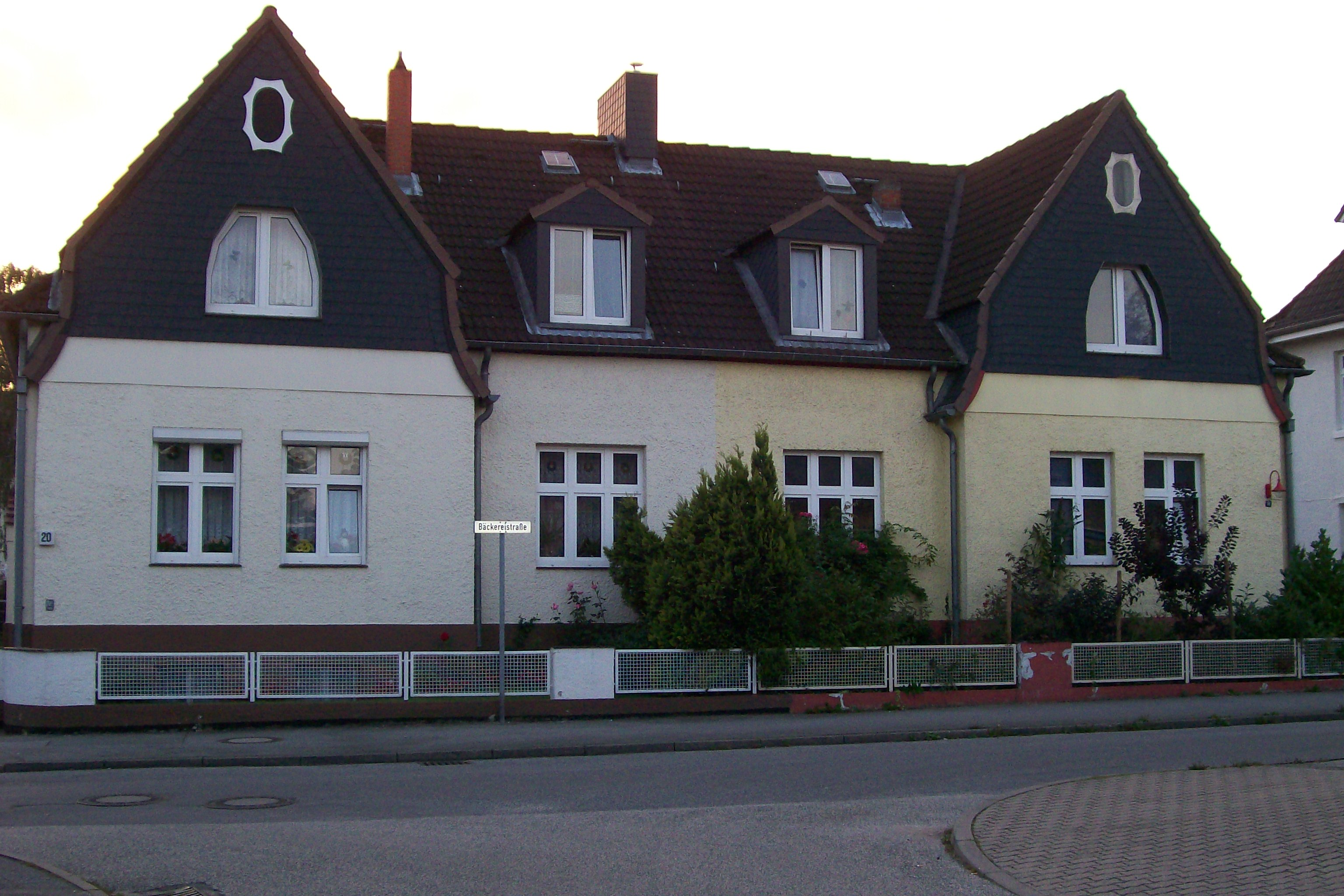 Doppelhaus in der Bäckereistraße in Lübeck-Herrenwyk aus der Zeit des Hochofenwerks Lübeck